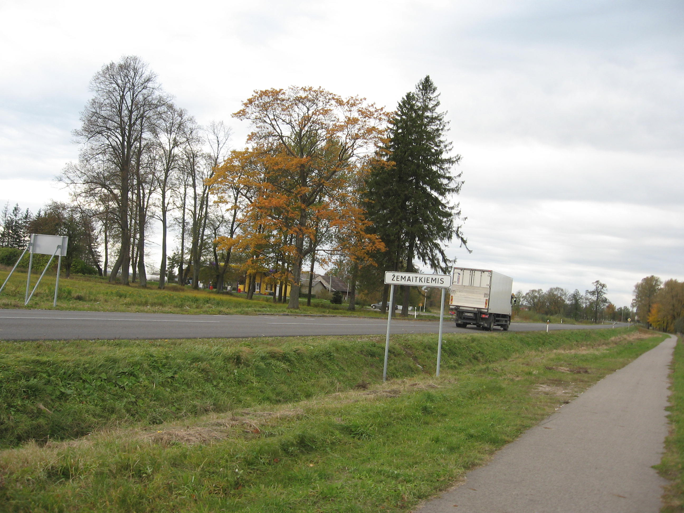 Žemaitkiemis (Usenai) prie kelio